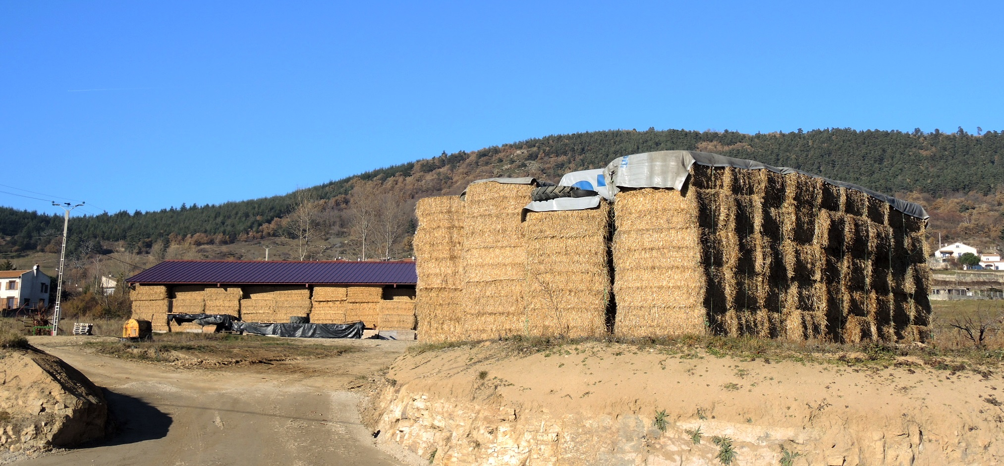 Saint-Clair (Ardèche) paille